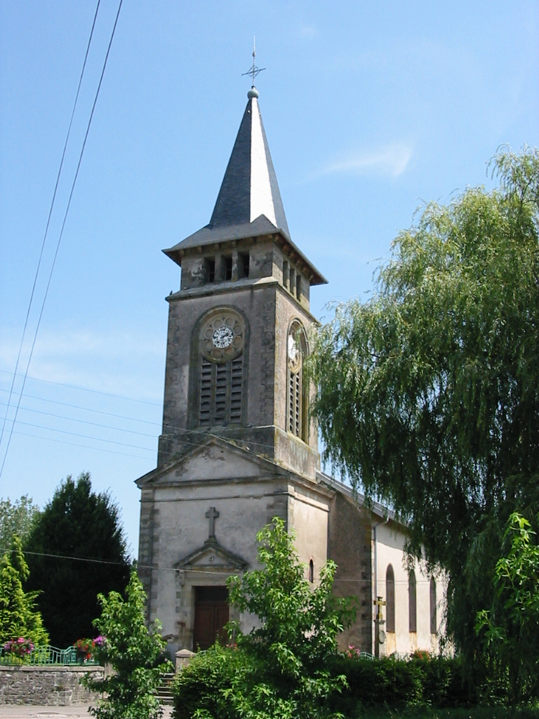 Doncières, commune des Vosges : l'église